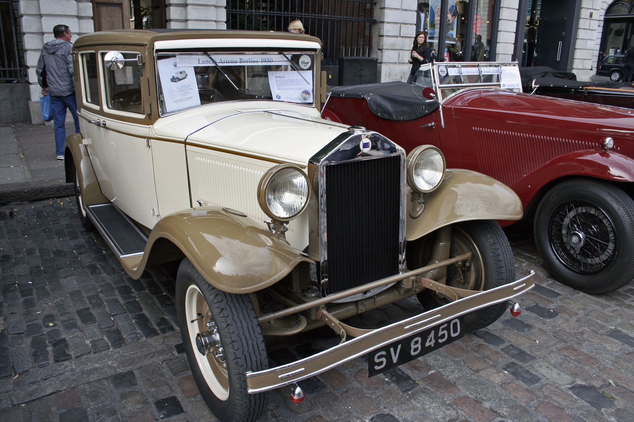 Lancia Artena Berlina 1930 in Covent Garden London 2007